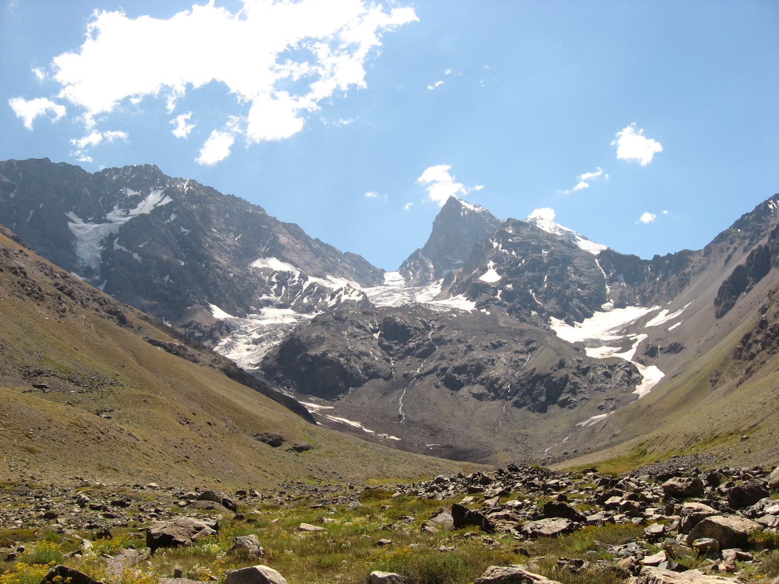 San Francisco Glacier. Near Lo Valdés in Chile